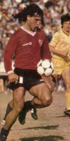 Alejandro Esteban Barberón en la final de la Copa Intercontinental 1984, donde Independiente salió campeón frente al Liverpool FC.